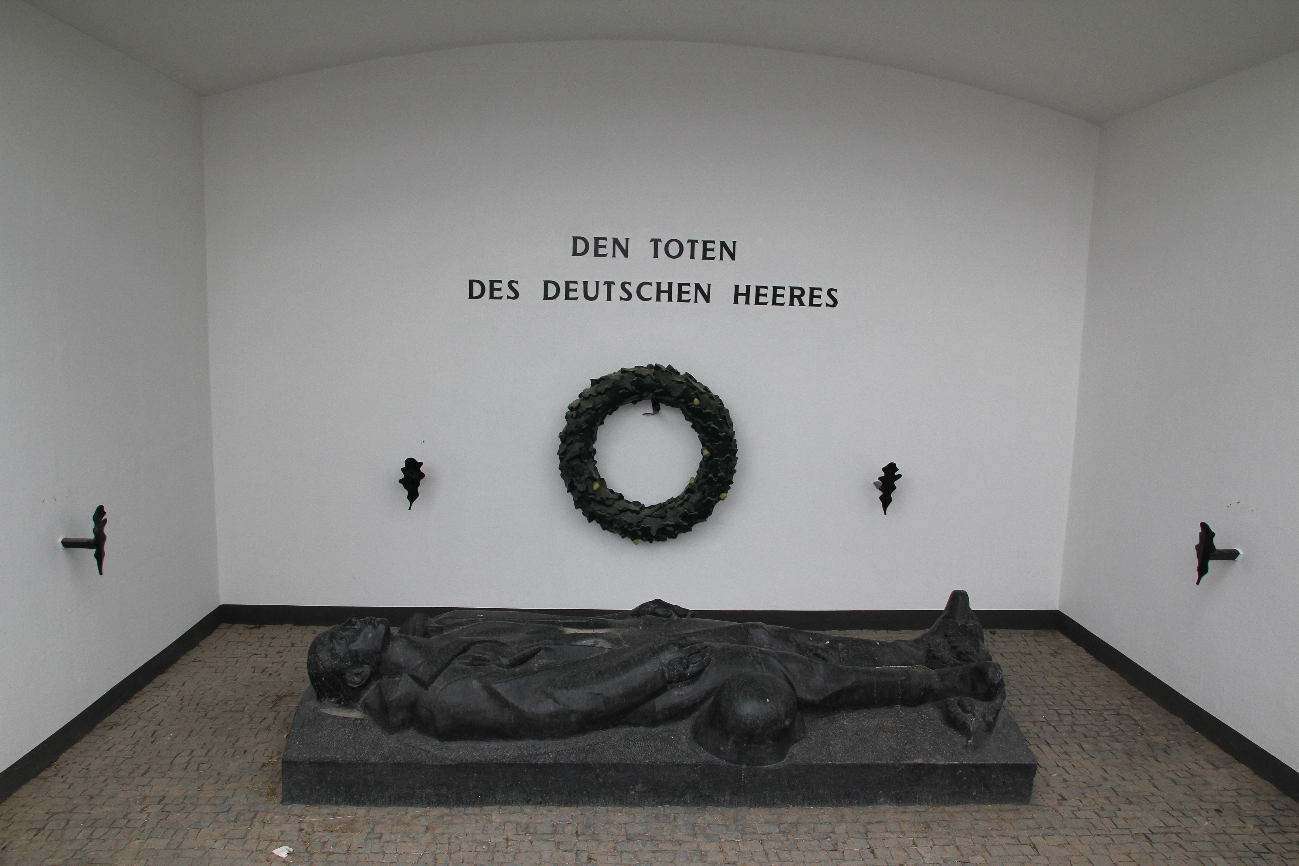 Koblenz im Buga-Jahr 2011 - Das Ehrenmal des Deutschen Heeres auf der Festung Ehrenbreitstein